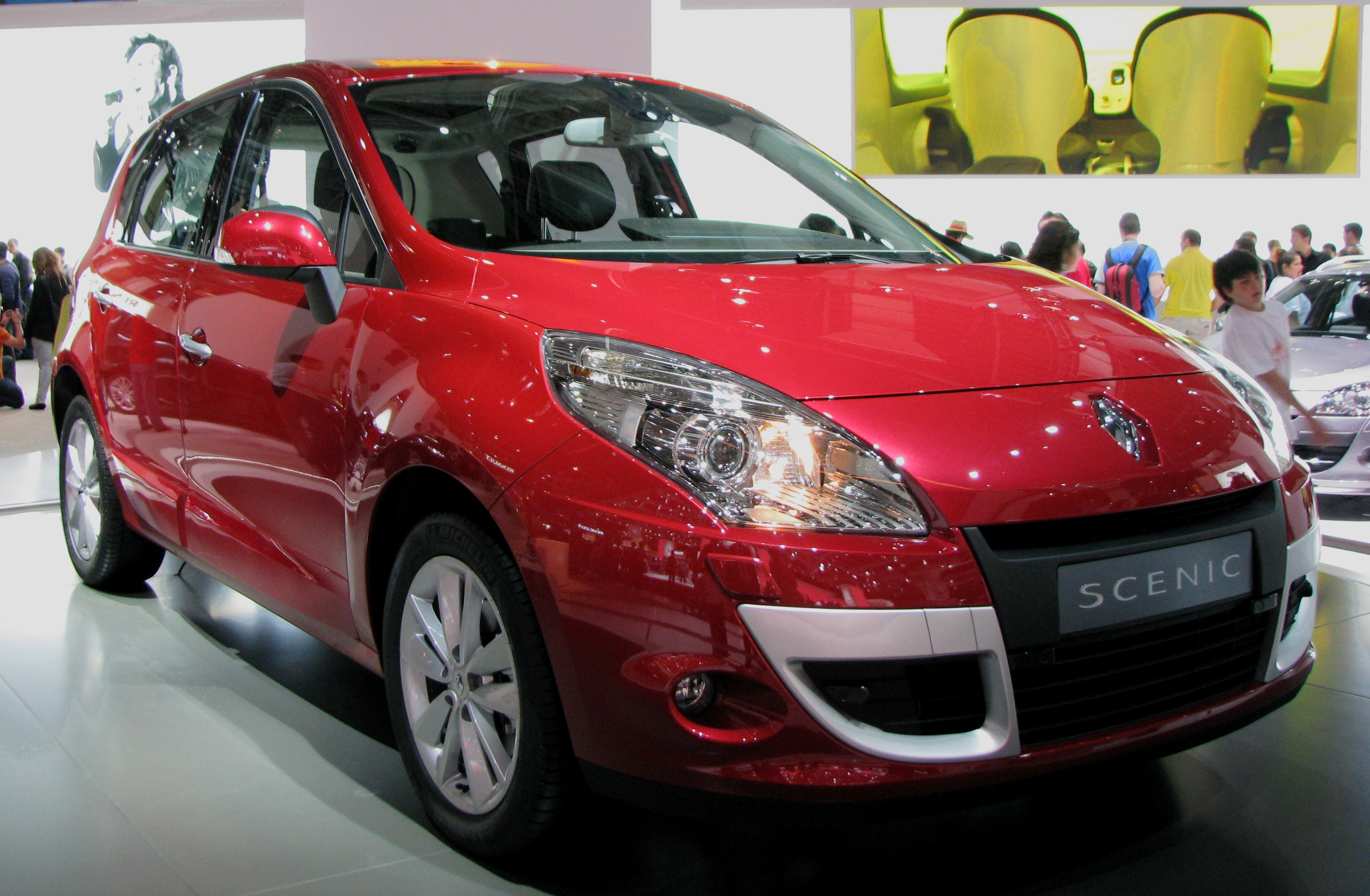 Renault Scenic III en el Salón Internacional del Automóvil de Barcelona 2009